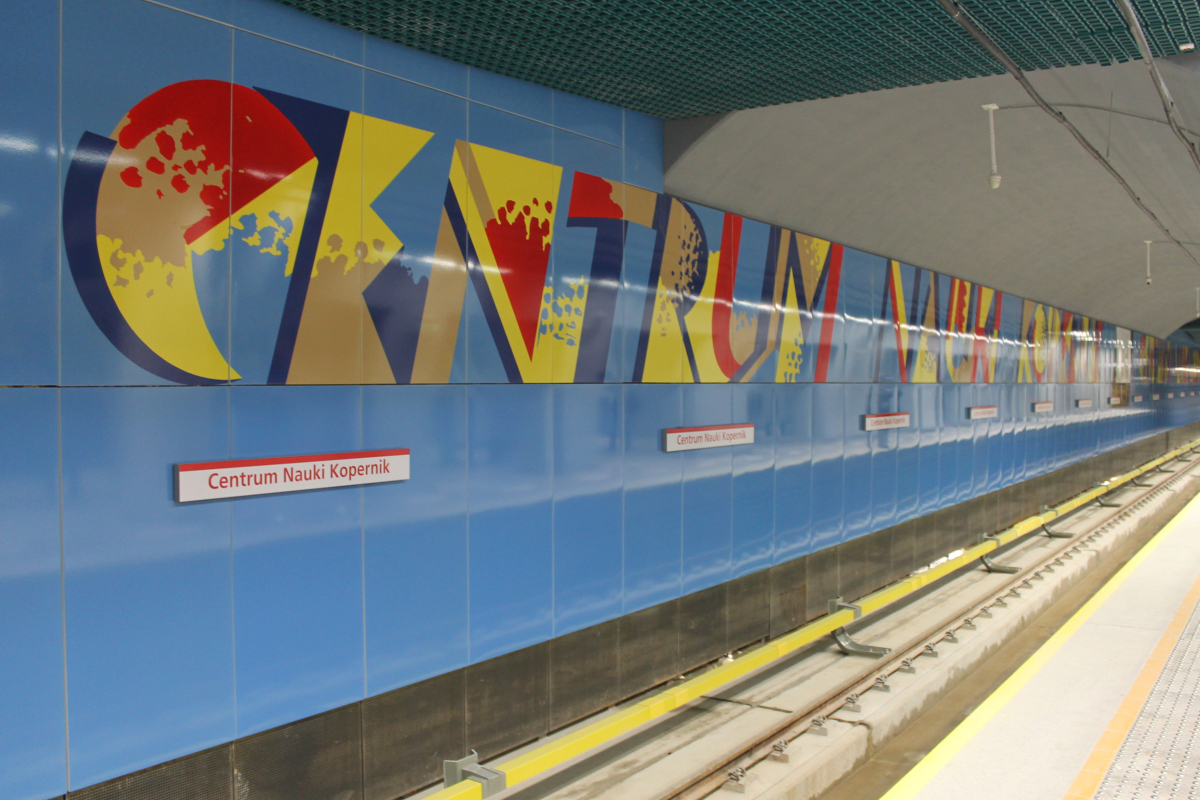 Ściana zatorowa na stacji C13 Centrum Nauki Kopernik. - Opracowanie graficzne Wojciech Fangor